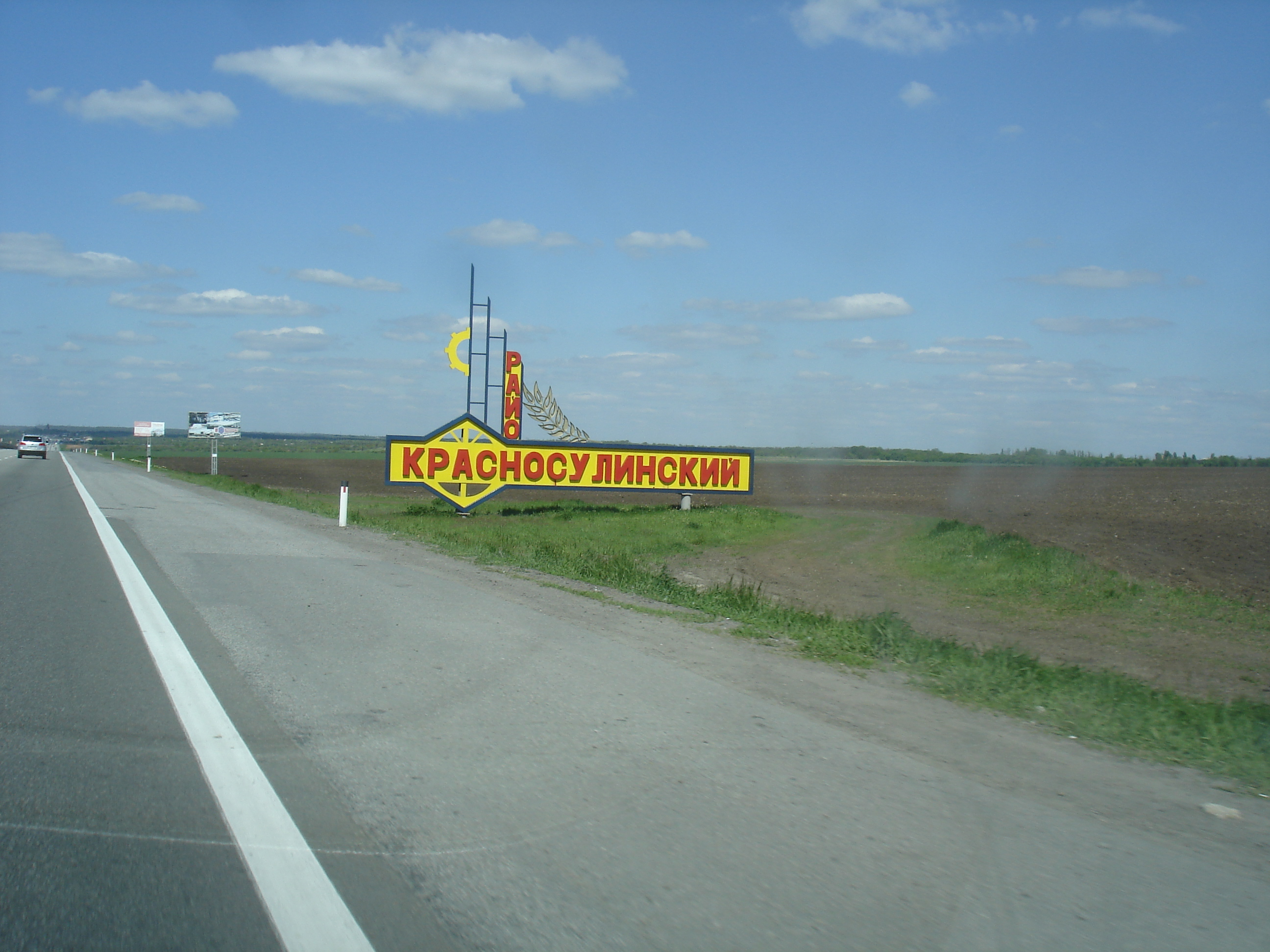 Указатель начала Красносулинского района на трассе М4